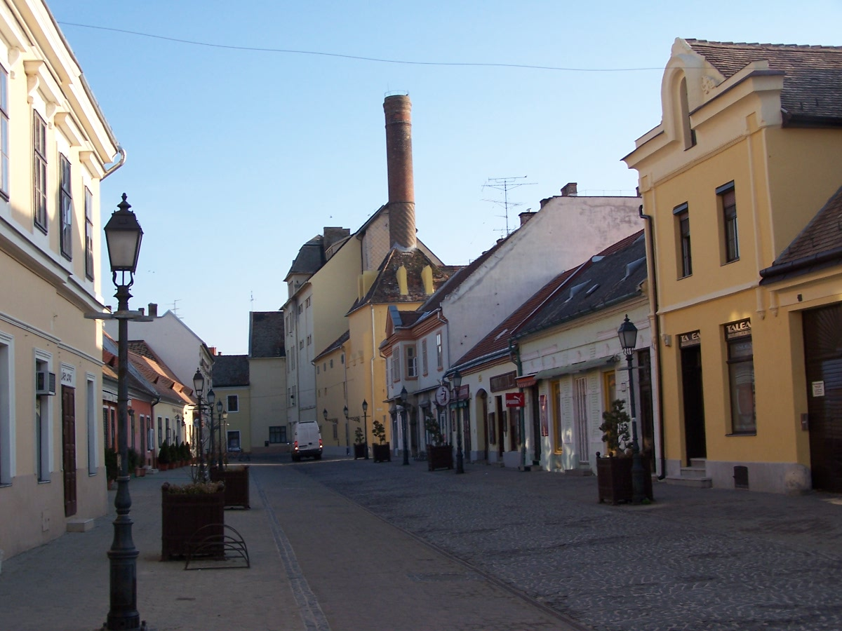 Mosonmagyaróvár, Magyar u Улочка в райцентре